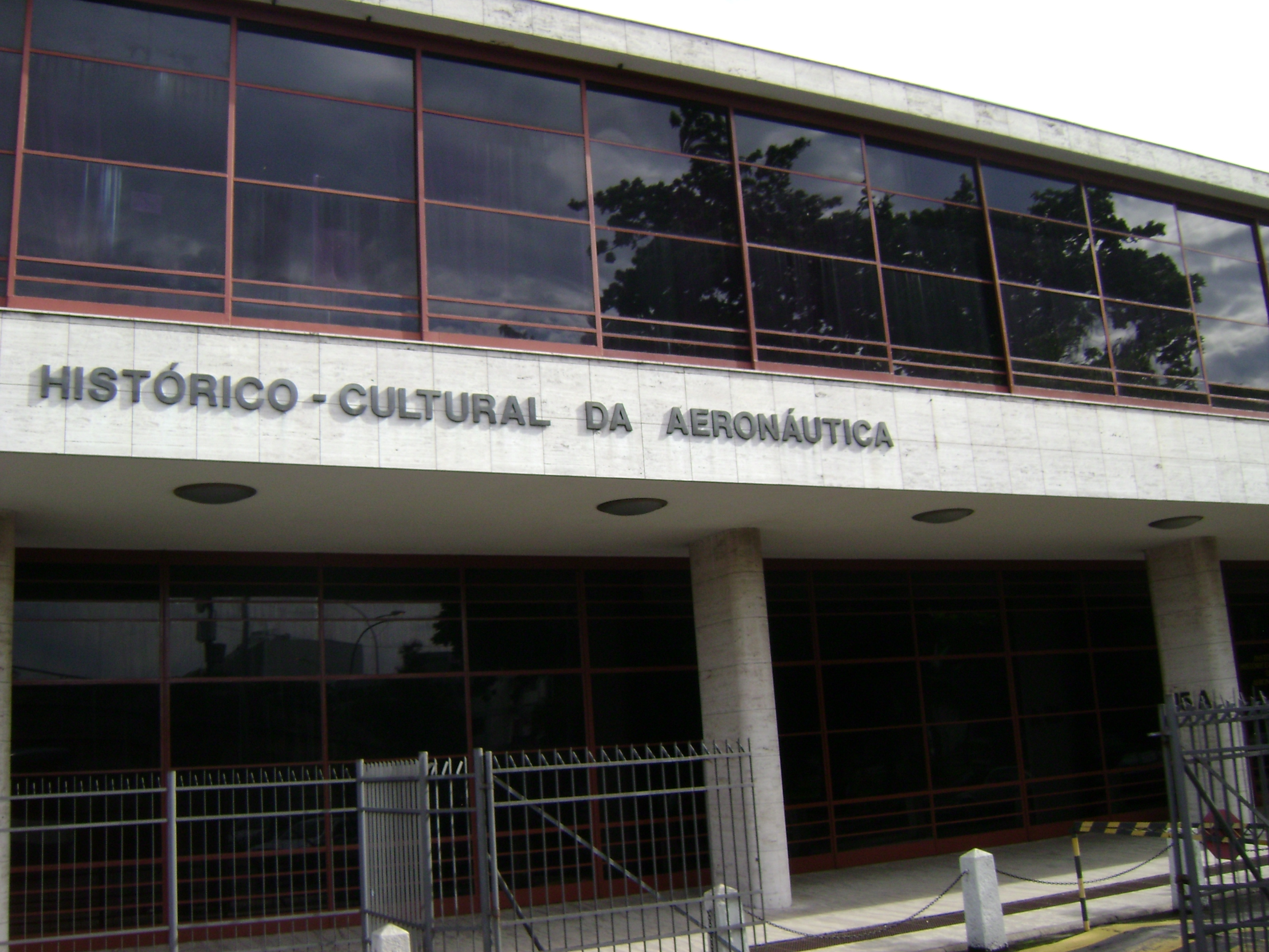 Edifício na cidade de Rio de Janeiro, Brasil.